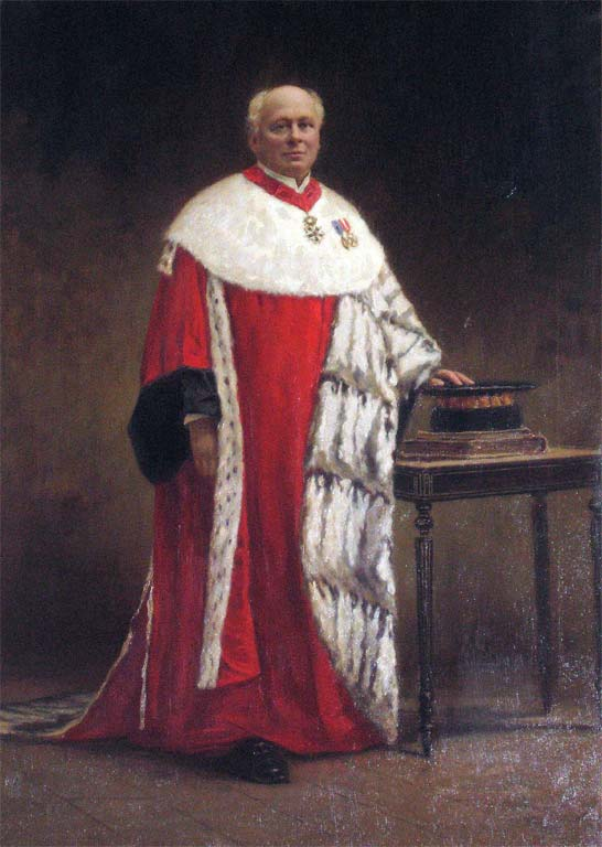 Alexis Ballot-Beaupré (1836-1917)